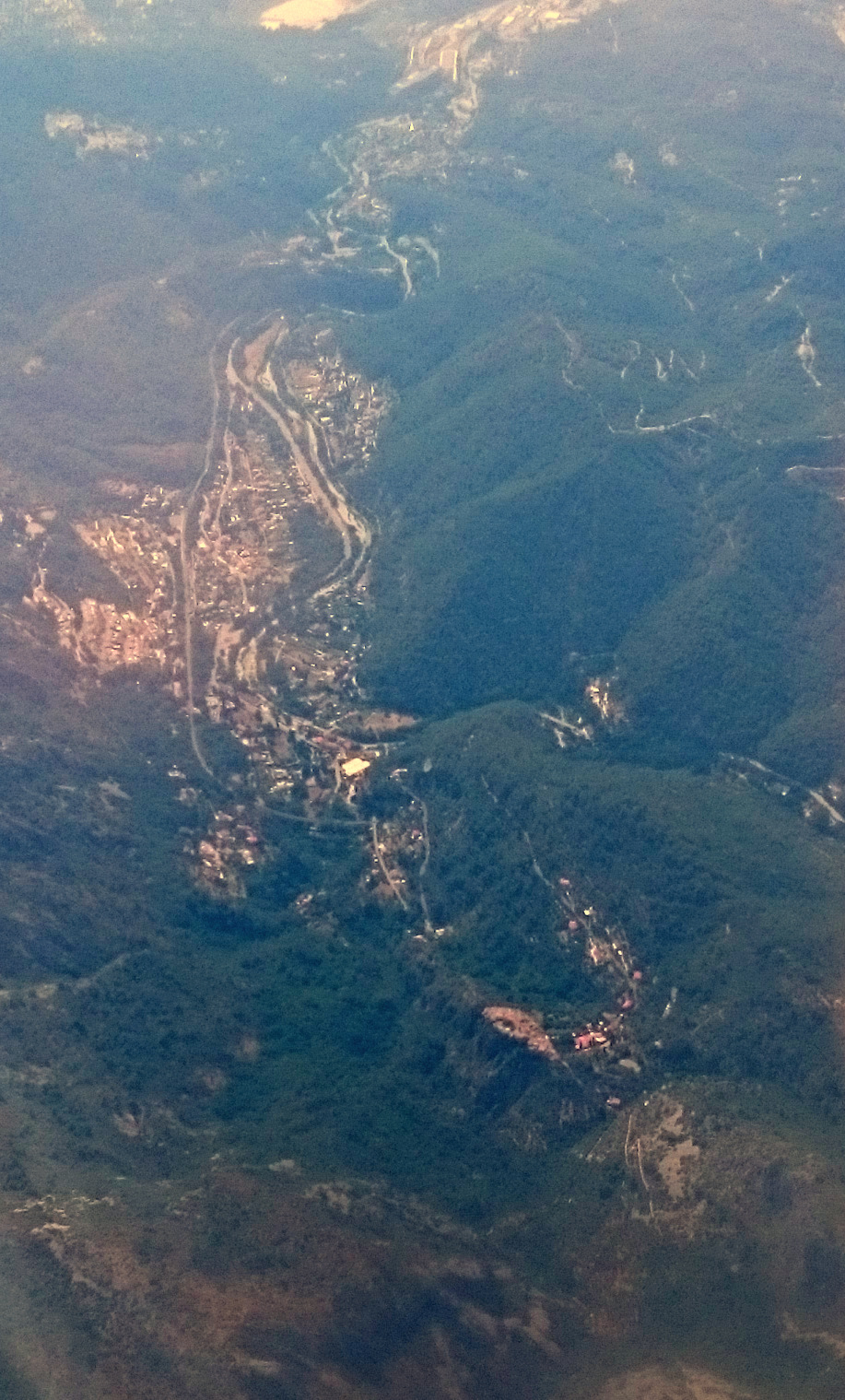 La commune de Peillon ainsi que son village sur piton rocheux en août 2015.